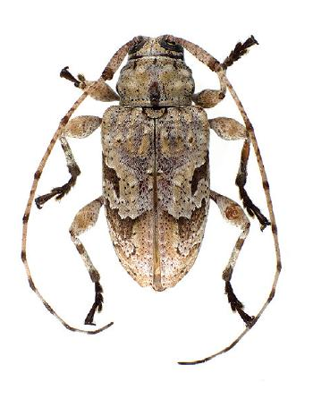 Leptostylopsis perfasciatus